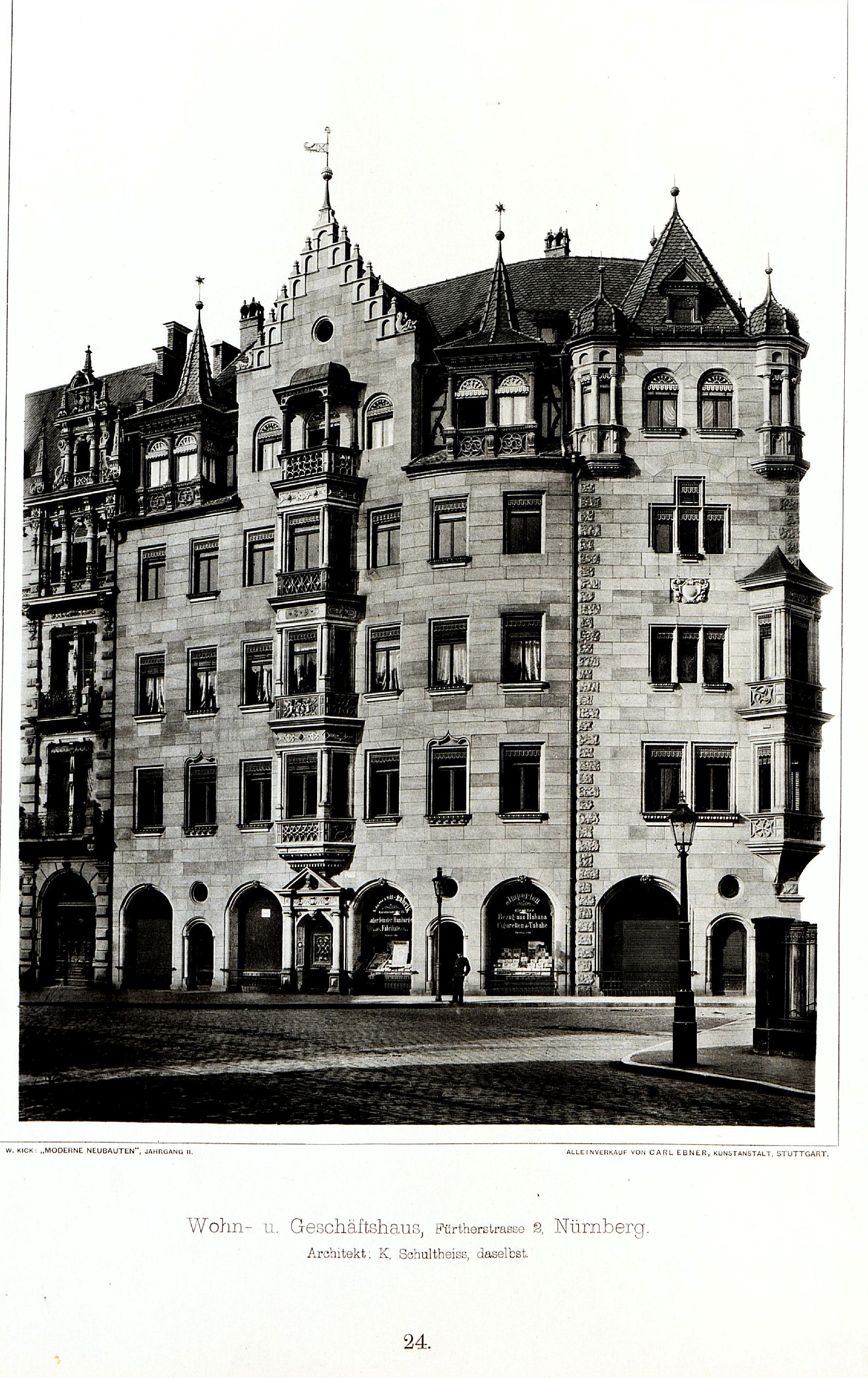 Wohn-_und_Geschäftshaus,_Fürther Straße_2,_Nürnberg,_Architekt_K._Schultheiss,_Tafel_24,_Kick_Jahrgang_II.jpg